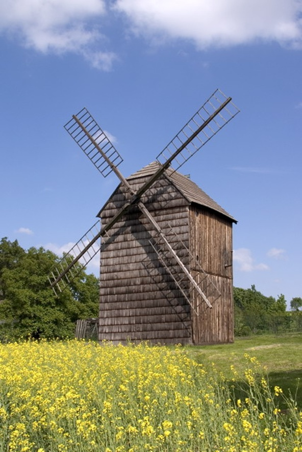 Větrný mlýn u Velkých Těšan